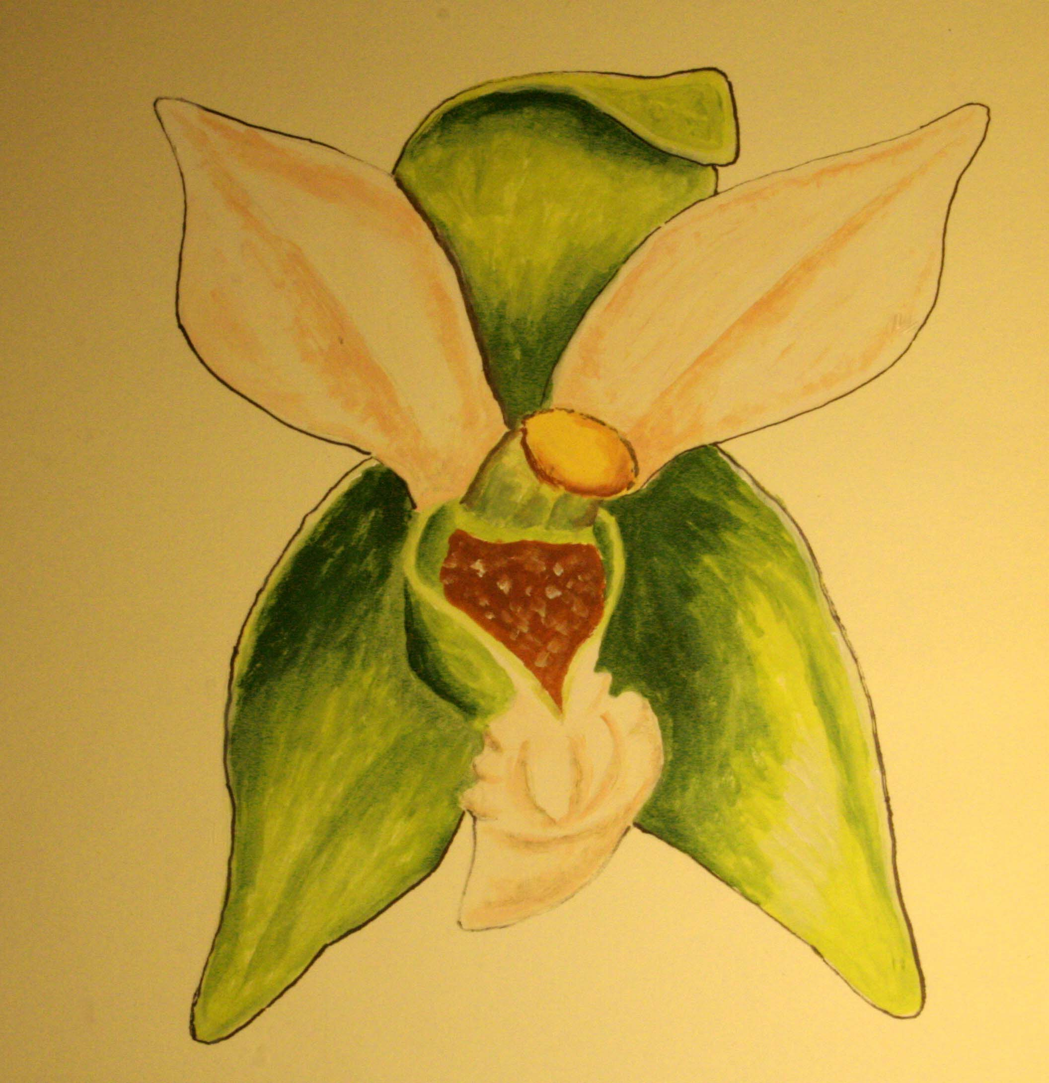 Epipactis greuteri